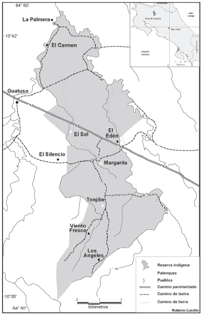 Asentamientos donde viven los indígenas guatusos de Costa Rica